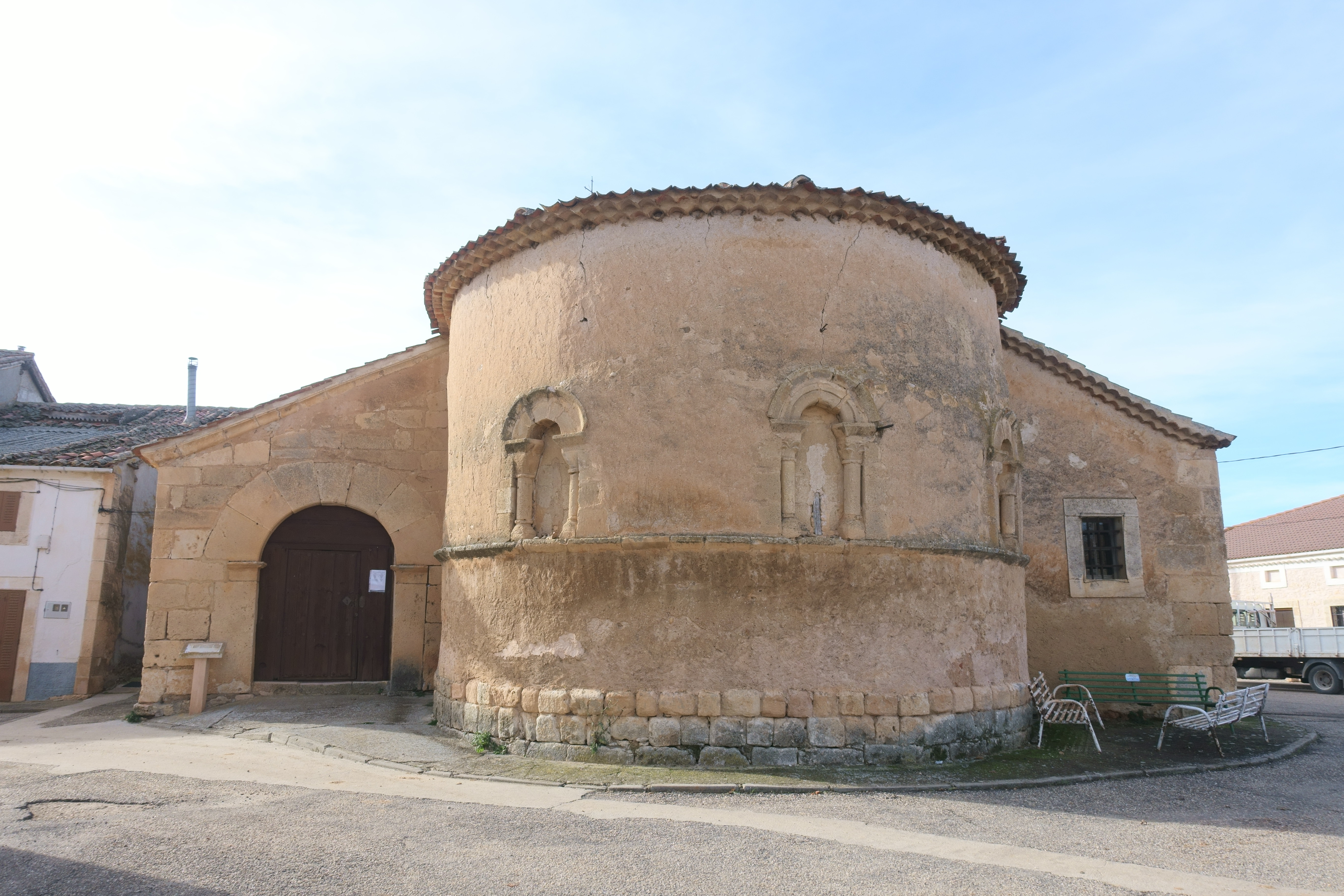 Iglesia de Santo Domingo de Guzmán, Pajarejos (Segovia, España).